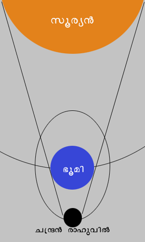 ചന്ദ്രഗ്രഹണം ഈ ചിത്രം അളവുകൾ കൃത്യമായി പാലിക്കുന്നില്ല